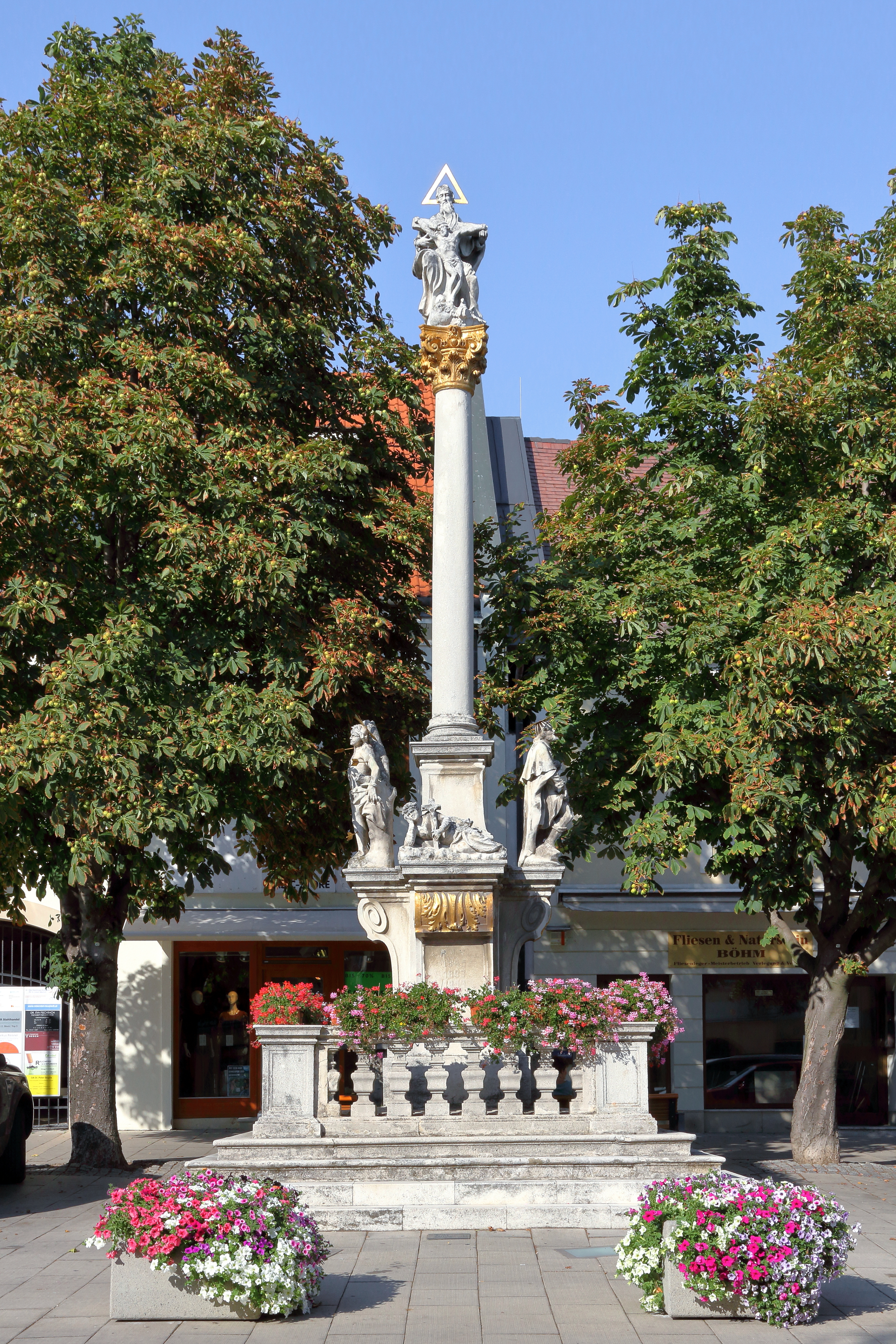 Die Pestsäule, auch als Dreifaltigkeits- und Kreuzsäule bezeichnet, in der burgenländischen Bezirkshauptstadt Neusiedl am See. Eine 1713 von Steinmetzmeister Elias Hügel errichtete Säule. Auf den Volutenpodesten des Sockels sind die Heiligen Rochus, Sebastian, Nepomuk und Rosalia dargestellt.